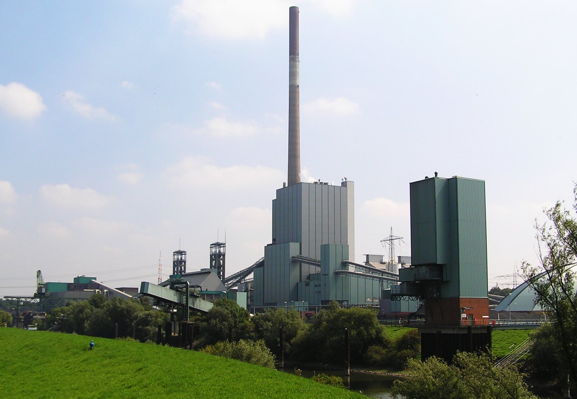 Kraftwerk/Zeche "Walsum", seen from Rhine port, Duisburg